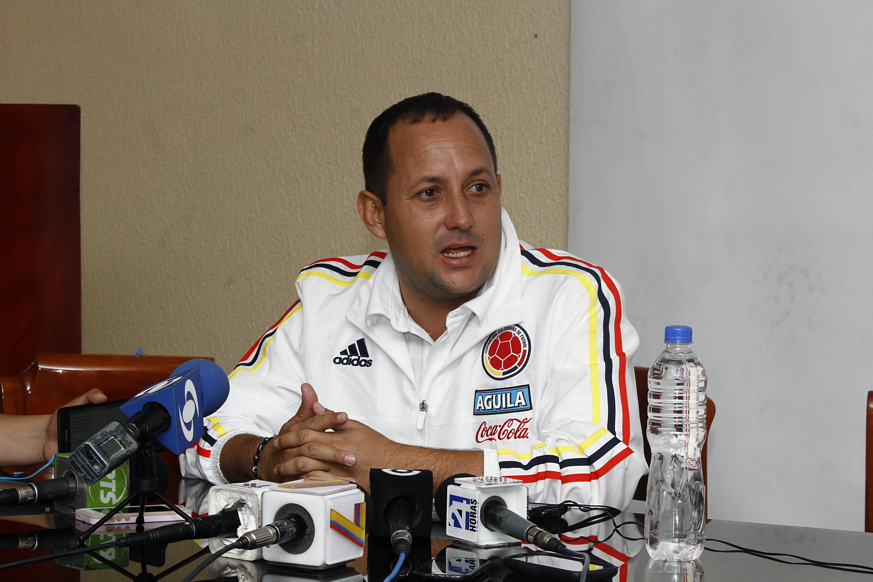 Tulcán, 11 abr (Andes).- La selección ecuatoriana de fútbol femenino perdió 4-1 este sábado en Tulcán (norte andino) ante Colombia en su tercer cotejo internacional preparatorio para el Mundial de Canadá. Foto: Micaela Ayala V./ANDES